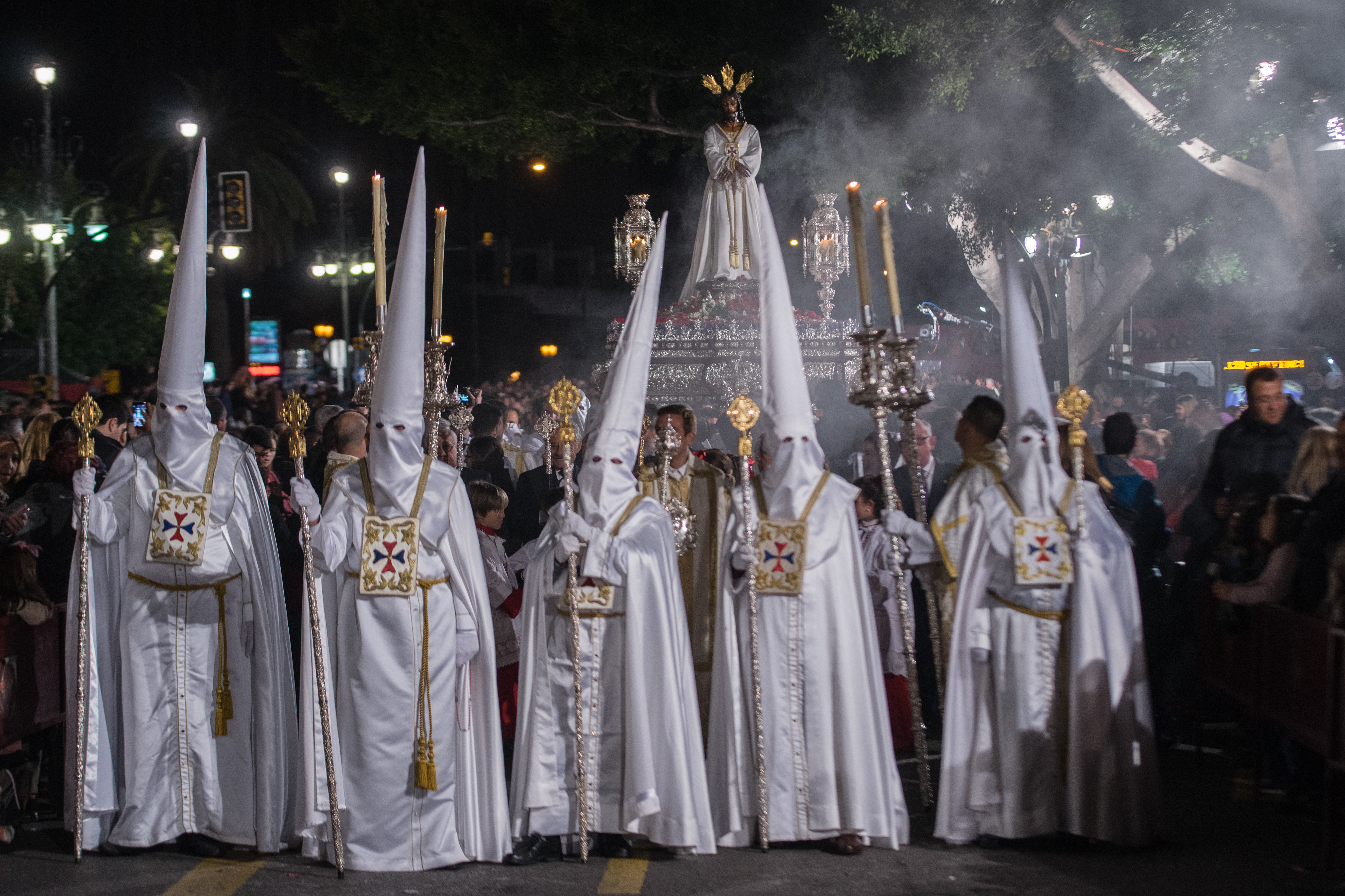 Trono del Cautivo de la Real, Muy Ilustre y Venerable Cofradía de Nazarenos de Nuestro Padre Jesús Cautivo, María Santísima de La Trinidad Coronada y del Glorioso Apóstol Santiago This is a photography of a Folklore festival in Spain (Wikidata id Q9075883).